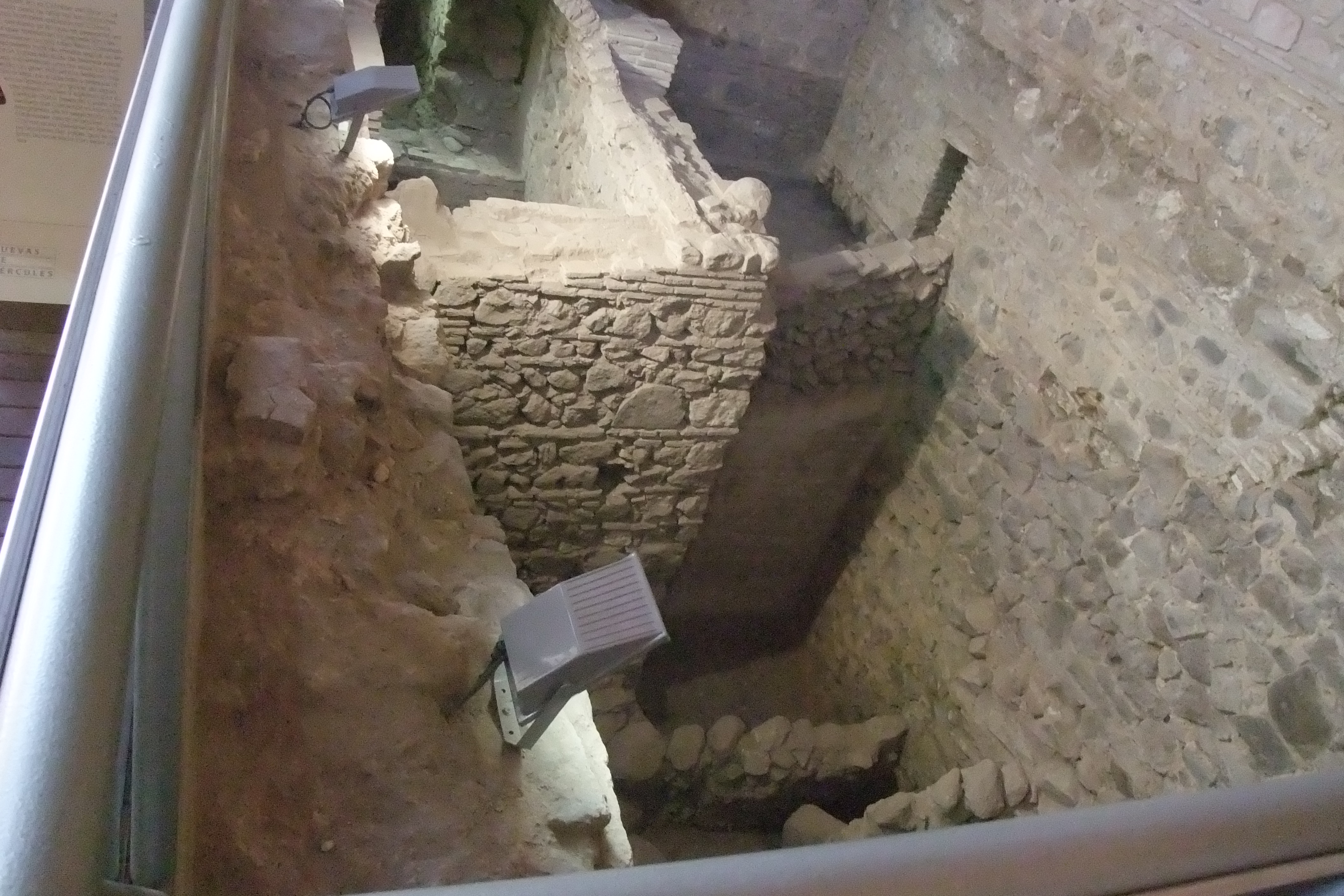 Cavernes d'Hercule à Tolède : aperçu du site archéologique depuis le rez-de-chaussée.